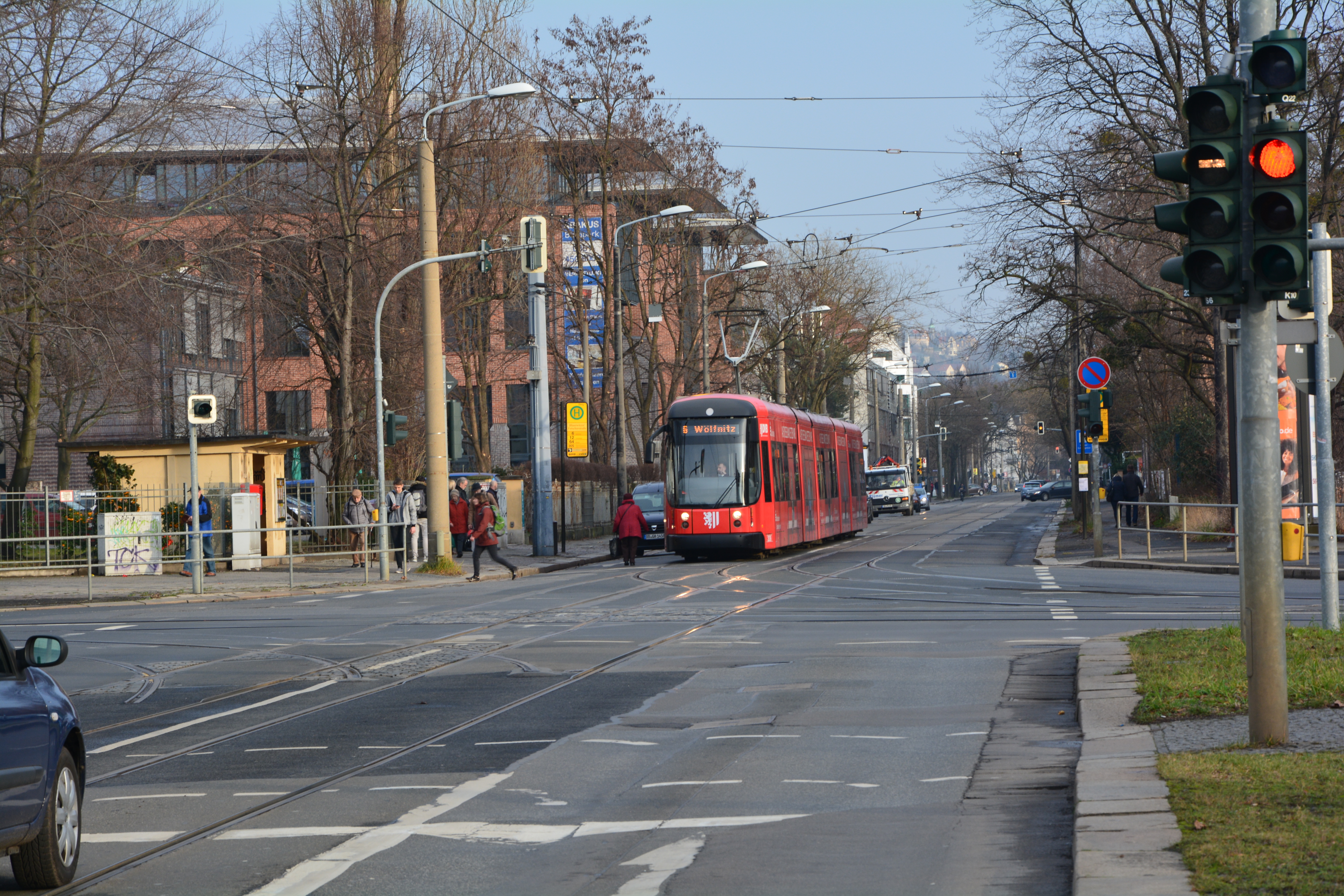 Dresden, Blasewitzer Straße 2018. Kreuzung Fetscherstraße. Blick Richtung Königsheimplatz.